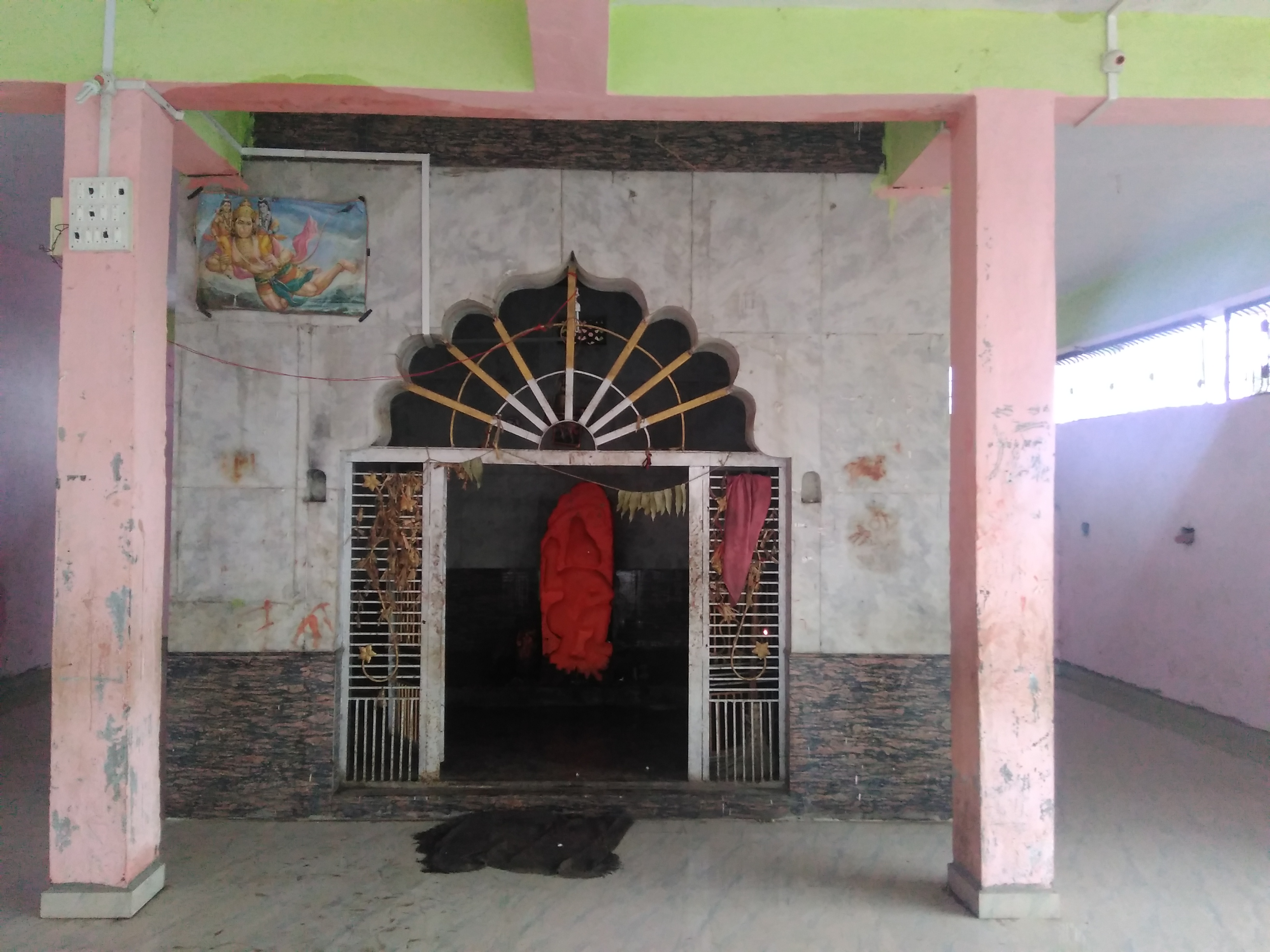 हनूमान मंदिर, खासगाव